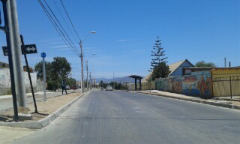 Avenida Gabriel González Videla, en calle Los Perales.